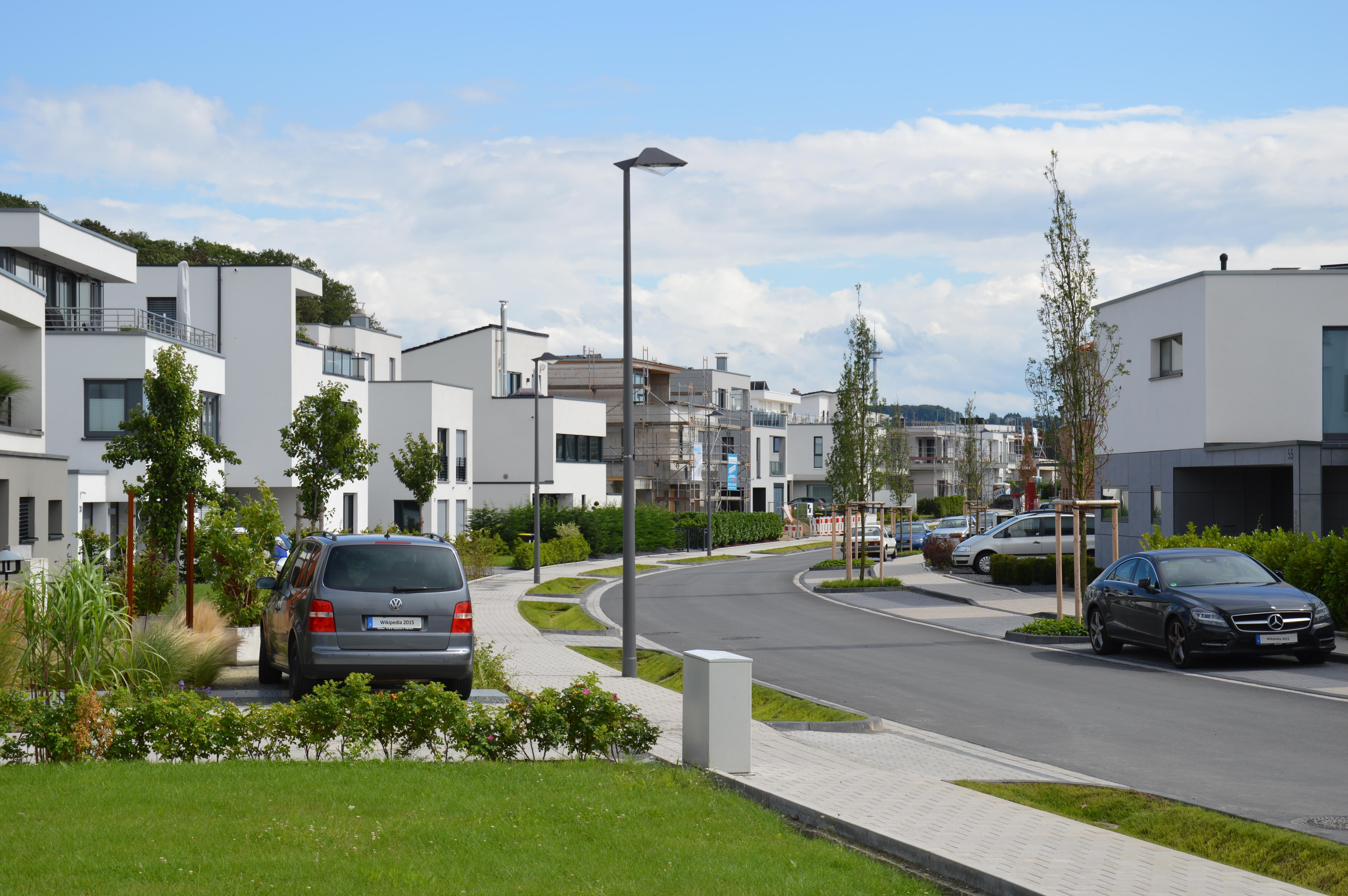 Phönixsee Siedlung Nordufer